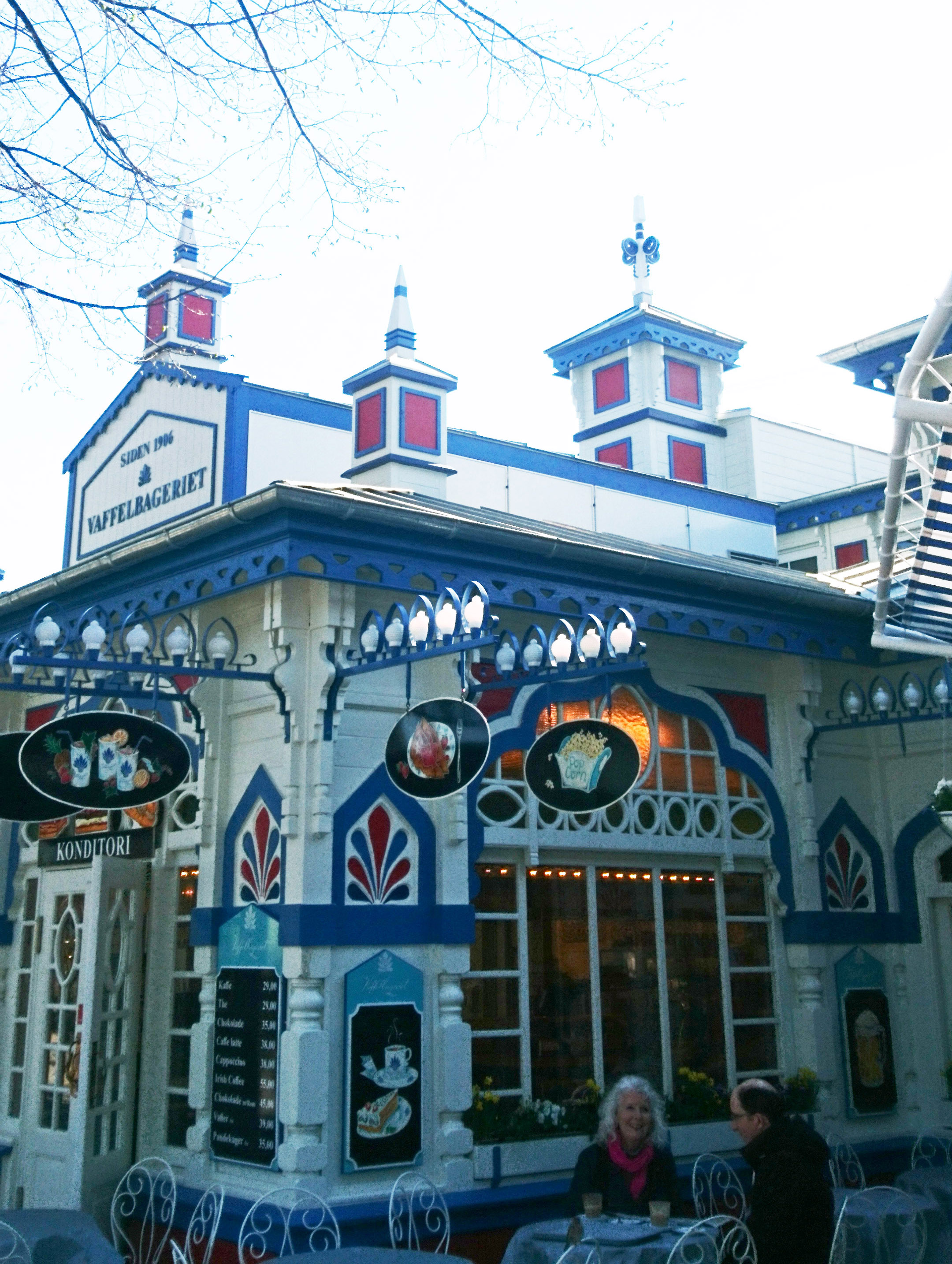 Vaffelbageriet i Tivoli efter ombygning i 2019